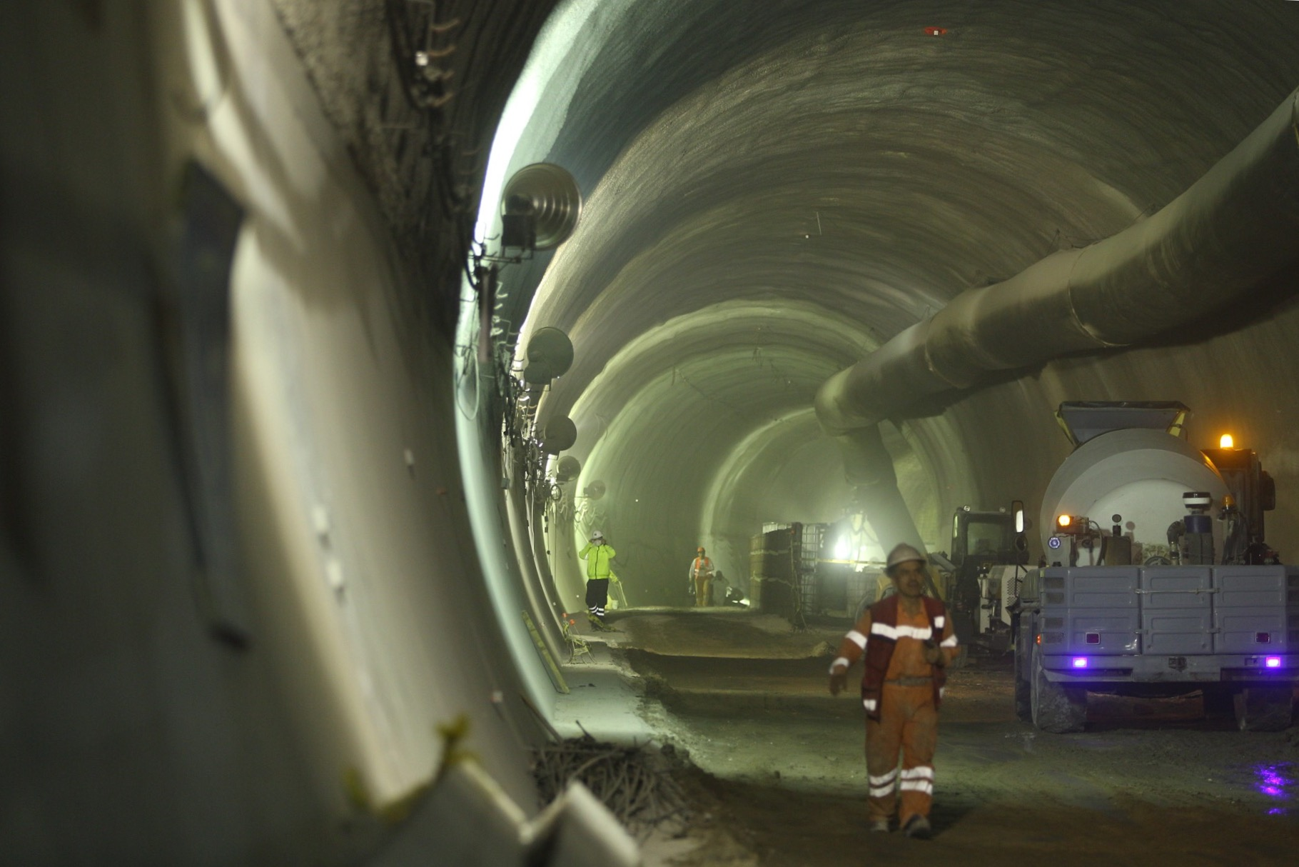 Obras en el Metro Línea 12, Ciudad de México